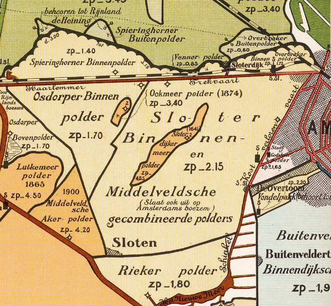 Sloter_en_Middelveldsche_Gecombineerde_Polders